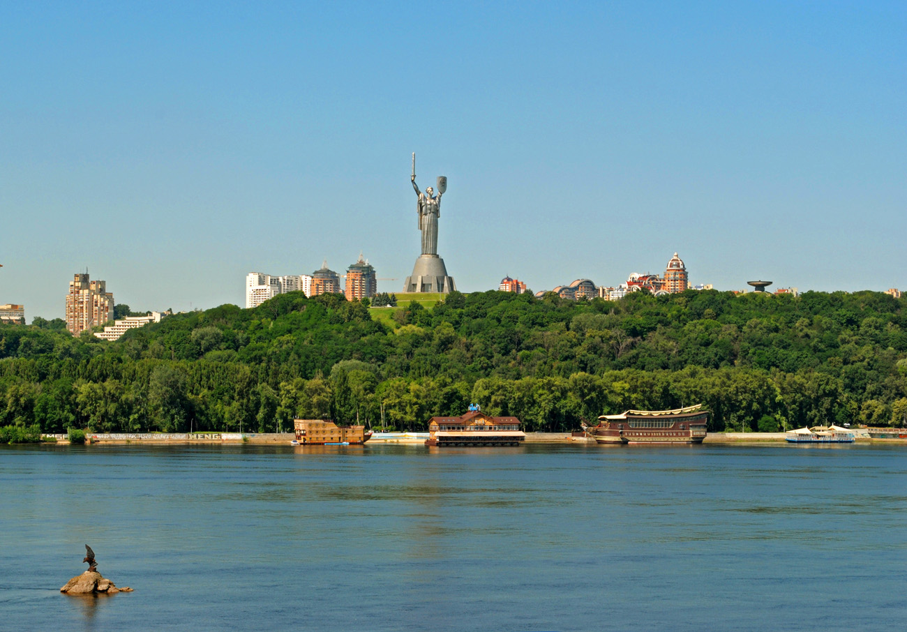 Печерський ландшафтний парк, Печерський район